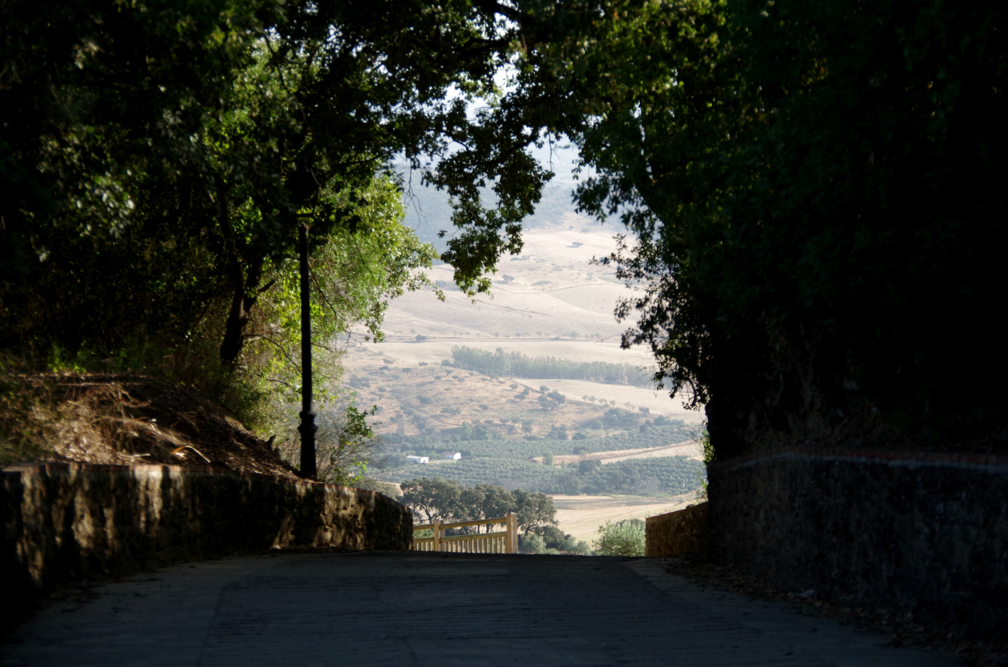 View from Convento de Caños Santos